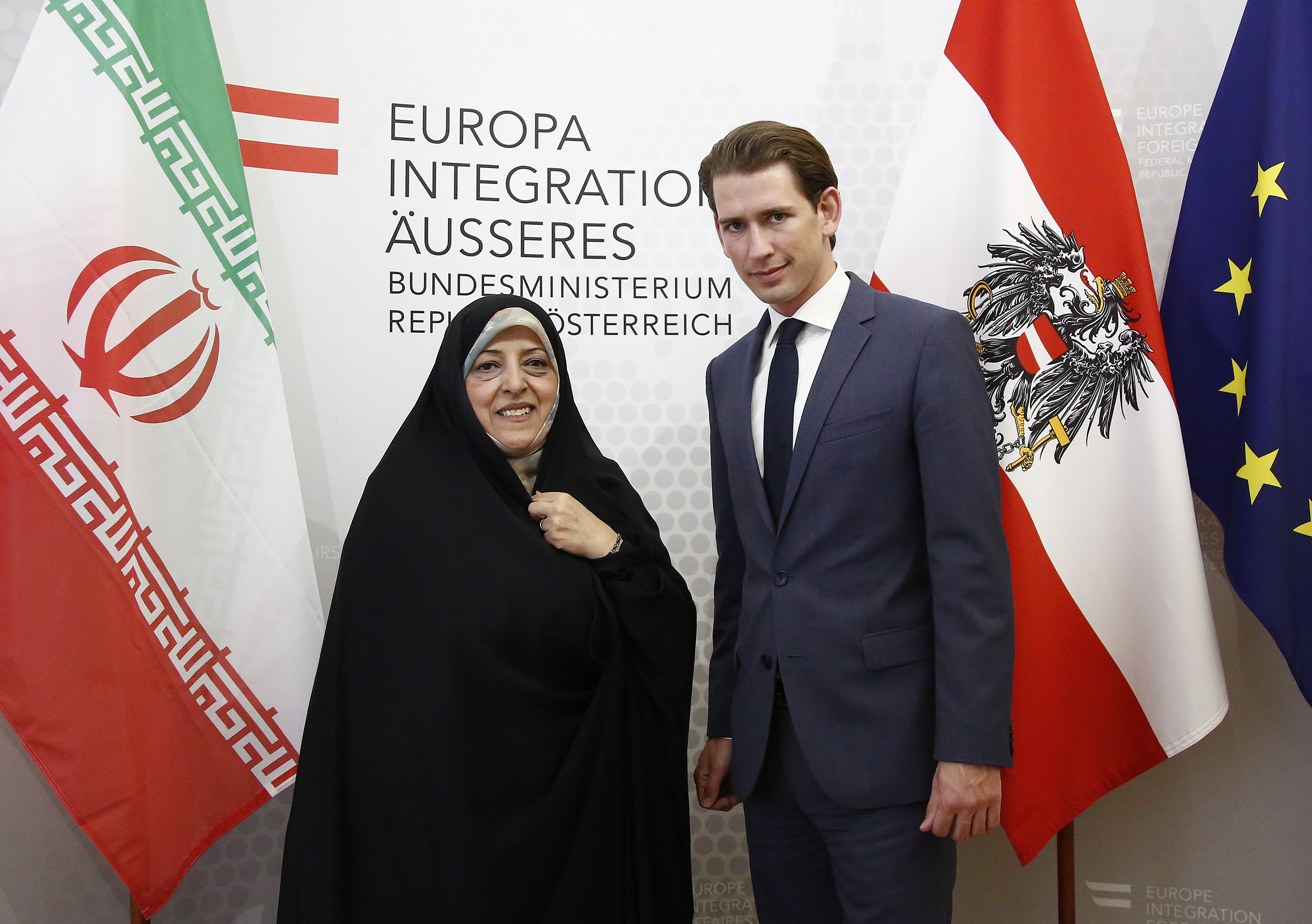 Bundesminister Sebastian Kurz empfängt Masoumeh Ebtekar, Vizepräsidentin des Iran. Wien. 13.09.2016, Foto: Dragan Tatic